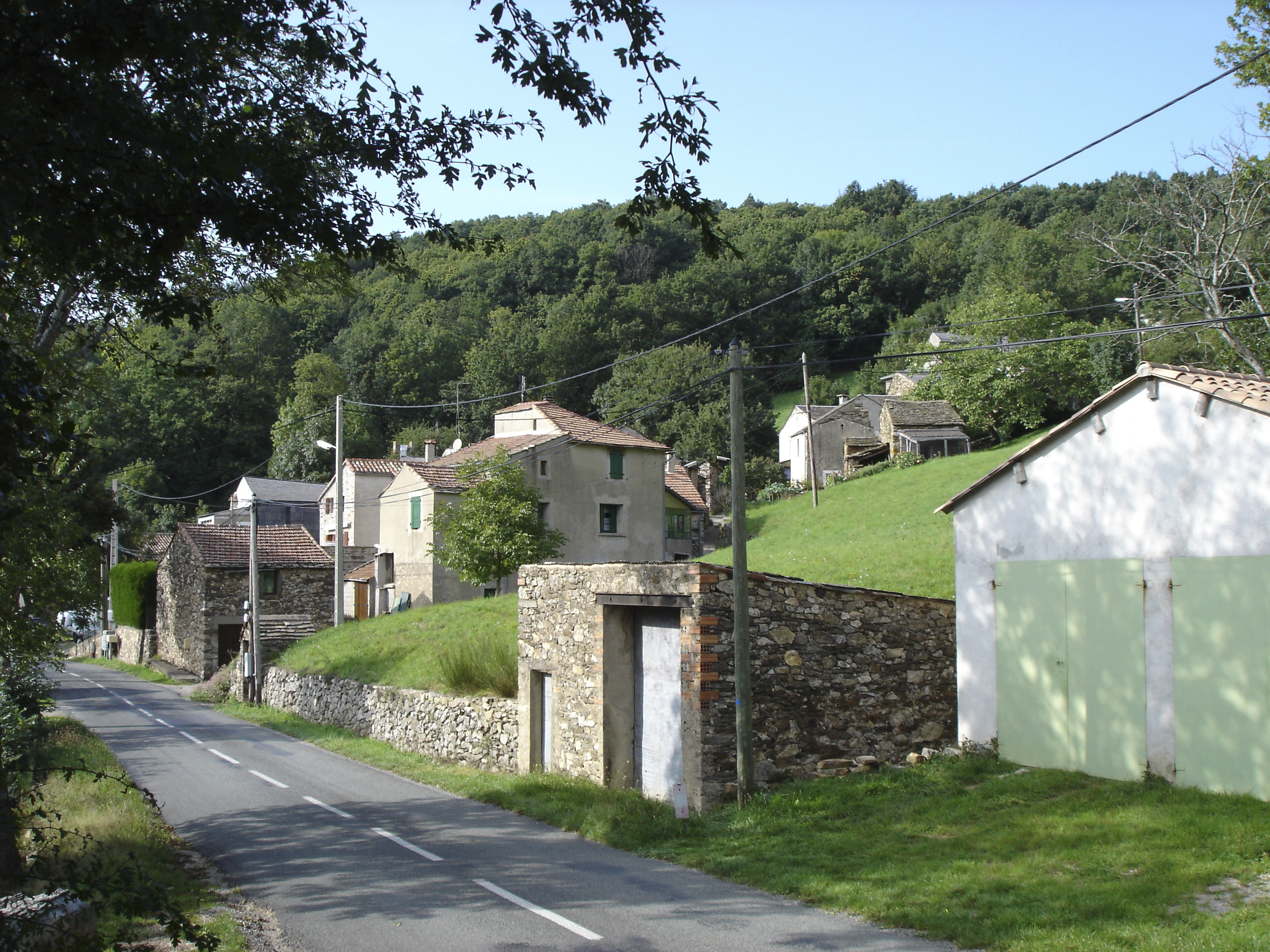 Rosis (Hérault)